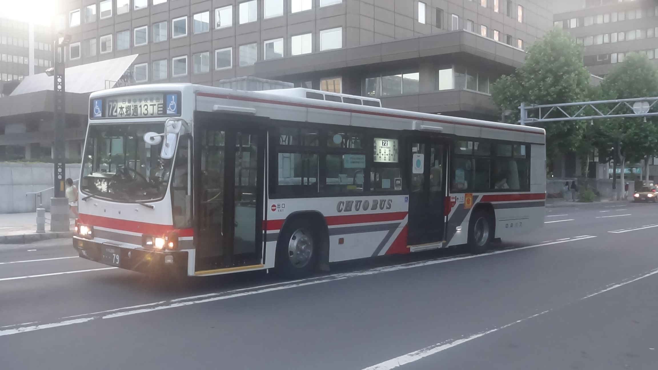 99年2月、平岡営業所に新製配置。01年に白石営業所に転籍され、現在に至る。白23･白28･72等の白石営業所所轄路線で活躍中。 13年7月時点で既存すしている、N尺中グライド仕様は、中央バス以外では、奈良交通とJR東日本BRT(ミヤコーバス受託、元京成車)の2社だけである。 メーカー:ISUZU 形式:KC-LV832N 名称:CUBIC エンジン:中型用･6HE1-TCN型(230PS)+過給器 トランスミッション:AT、ZF製トルコン"ECOMAT" 扉:前中グライド仕様 エアコンユニット:ゼクセル製 製造年月:1999年2月 登録番号:札幌200か･･79 車番･其他の番号:668 其他:公式側先頭席無し